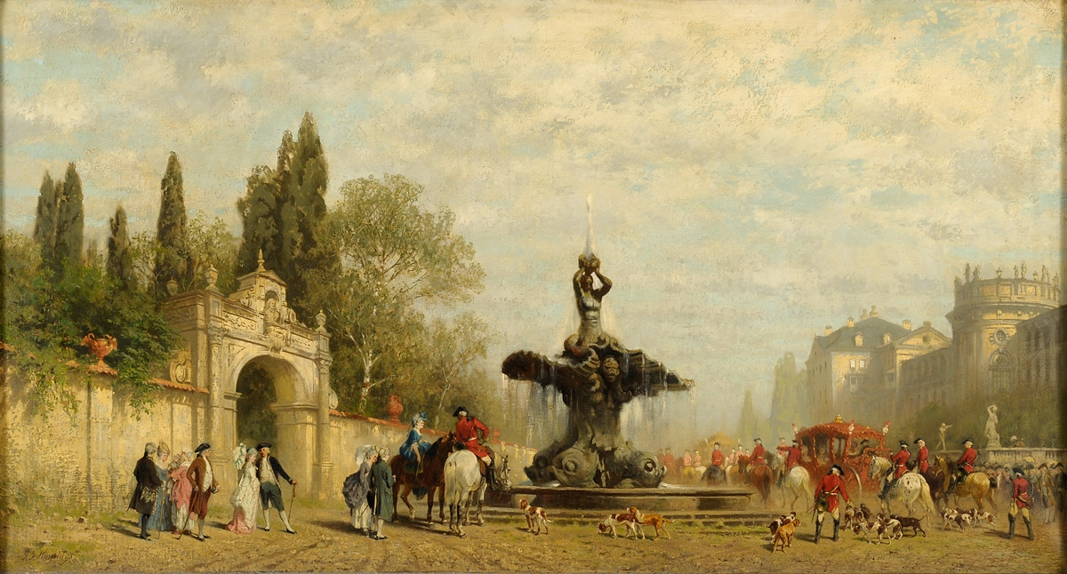 Fontana del Tritone, Piazza Barberini. Signiert. Öl/Lwd., 85 x 152 cm.